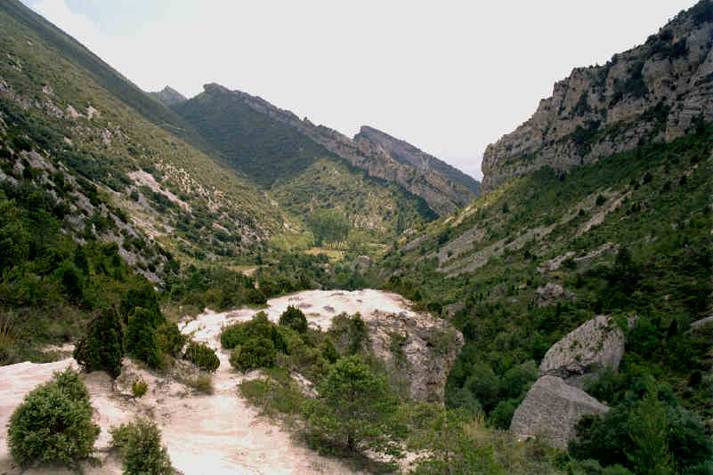 Desfiladero del río Purón en su parte intermedia, en el Parque natural de Valderejo, entre las provincias de Álava y Burgos (España). Se distinguen claramente las dos capas de roca caliza inclinadas que constituyen las paredes de este estrecho valle, entre las que el río ha disuelto y erosionado la capa intermedia de areniscas. Tomada por JMSE el 4 de julio de 2003 y cedida a Wikipedia. Categoría: Geología (imagen) Categoría:España (imagen)